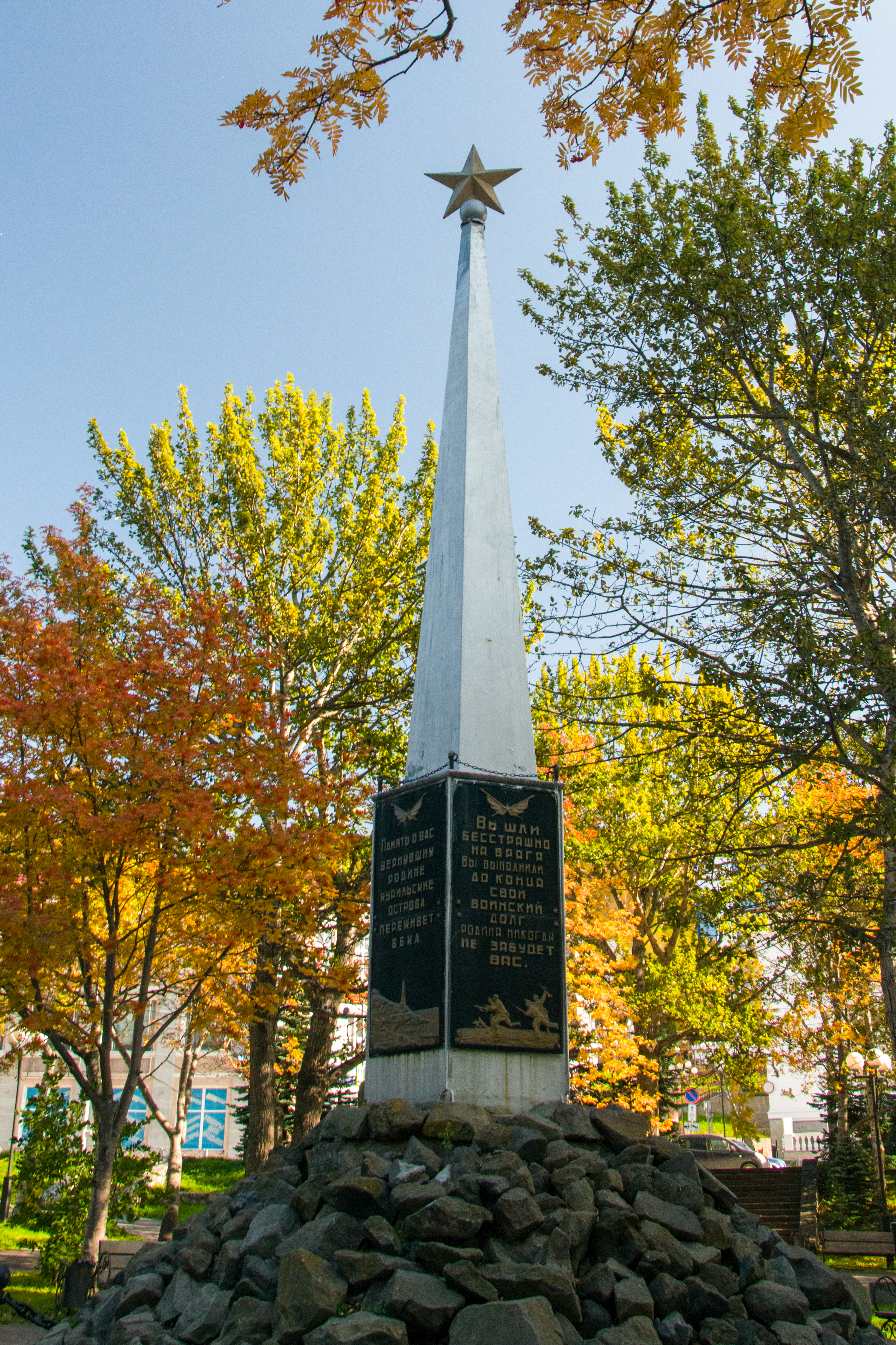 Памятник воинам Советской Армии, освободившим Курильские острова в 1945 г.: площадь Свободы, Петропавловск-Камчатский, Камчатский край